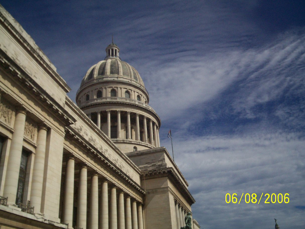 Capitolio Habanero